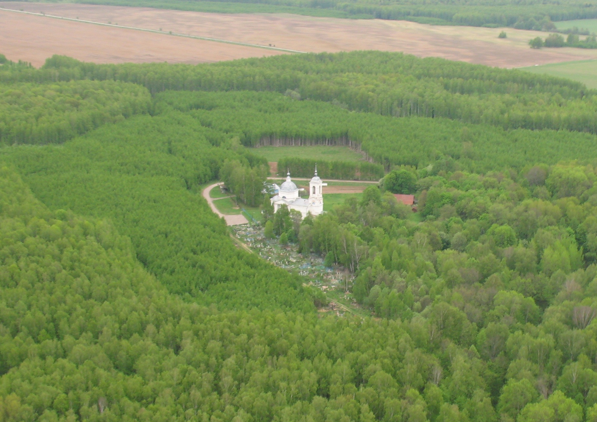 Одинокий храм Вознесения во Владимирской губернии